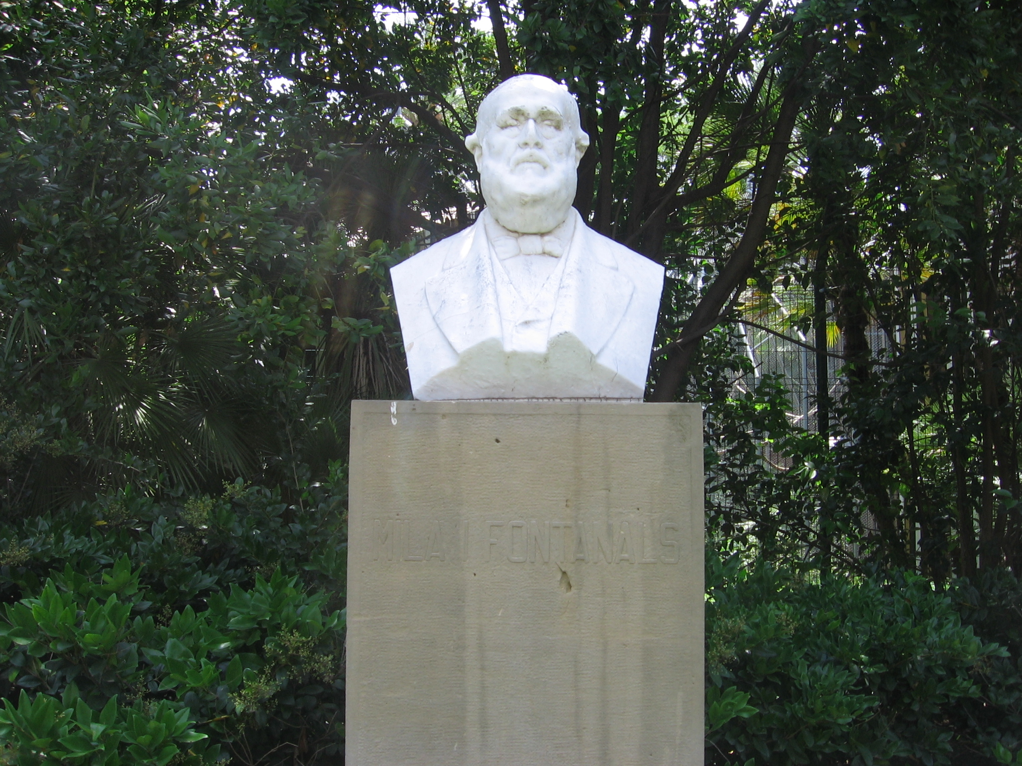 A Manuel Milà i Fontanals (Manuel Fuxà).